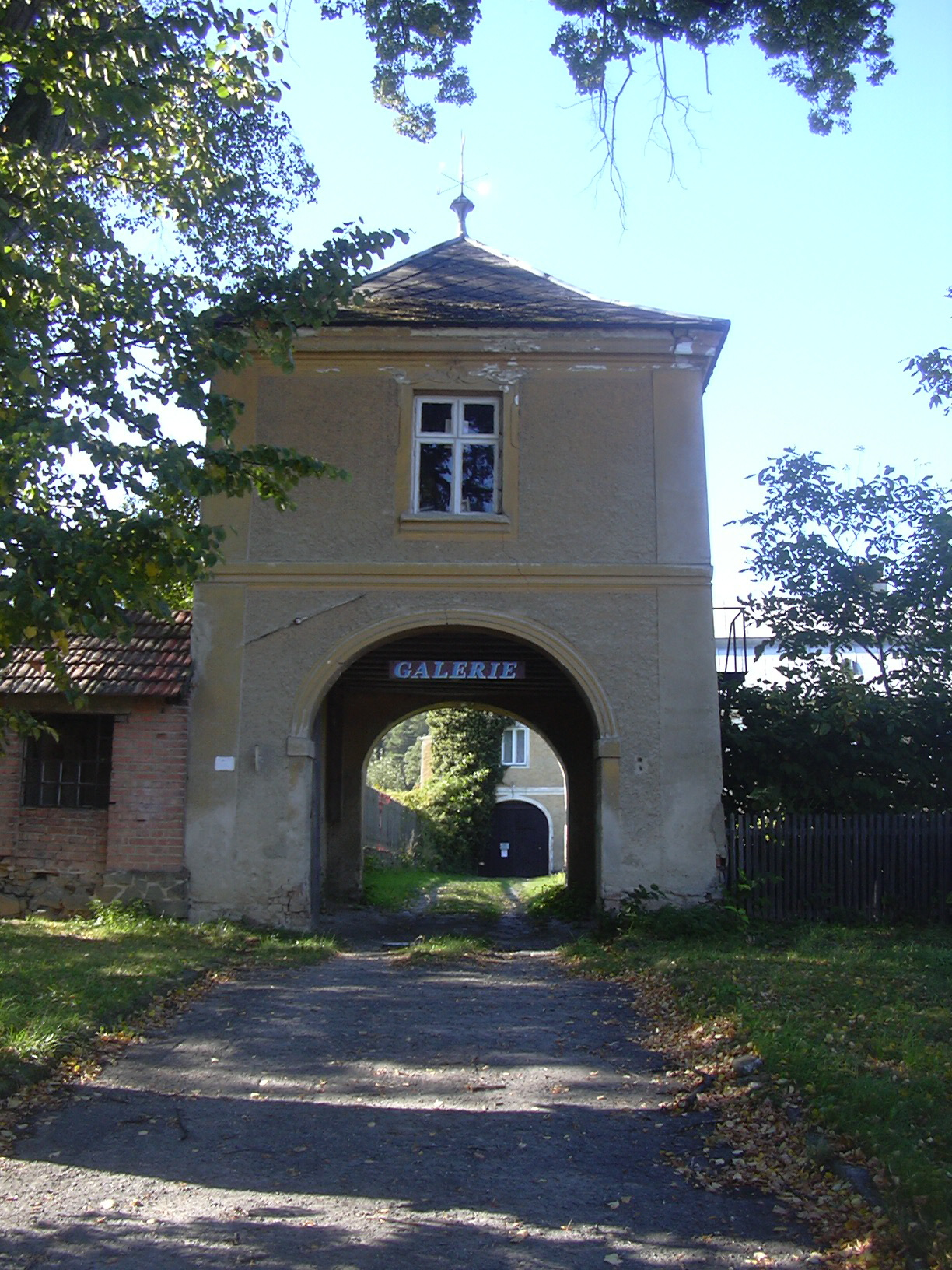 Vstupní brána na zámečku Troyerstein v Rychtářově, Vyškov, Česká republika